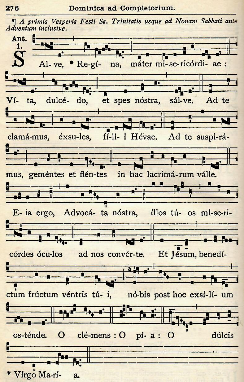 Quelle: Liber usualis missae et officii pro dominicis et festis cum cantu Gregoriano ex editione Vaticana adamussim excerpto a Solesmensibus Monachis. Desclée, Paris/Tournai 1954, S. 276